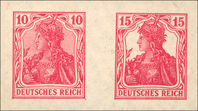 Probedrucke der Britischen "Germania-Fälschung" von 1918